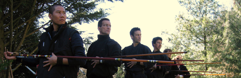 Sabacanakas (pratiquant la Voie du Sarbacana)